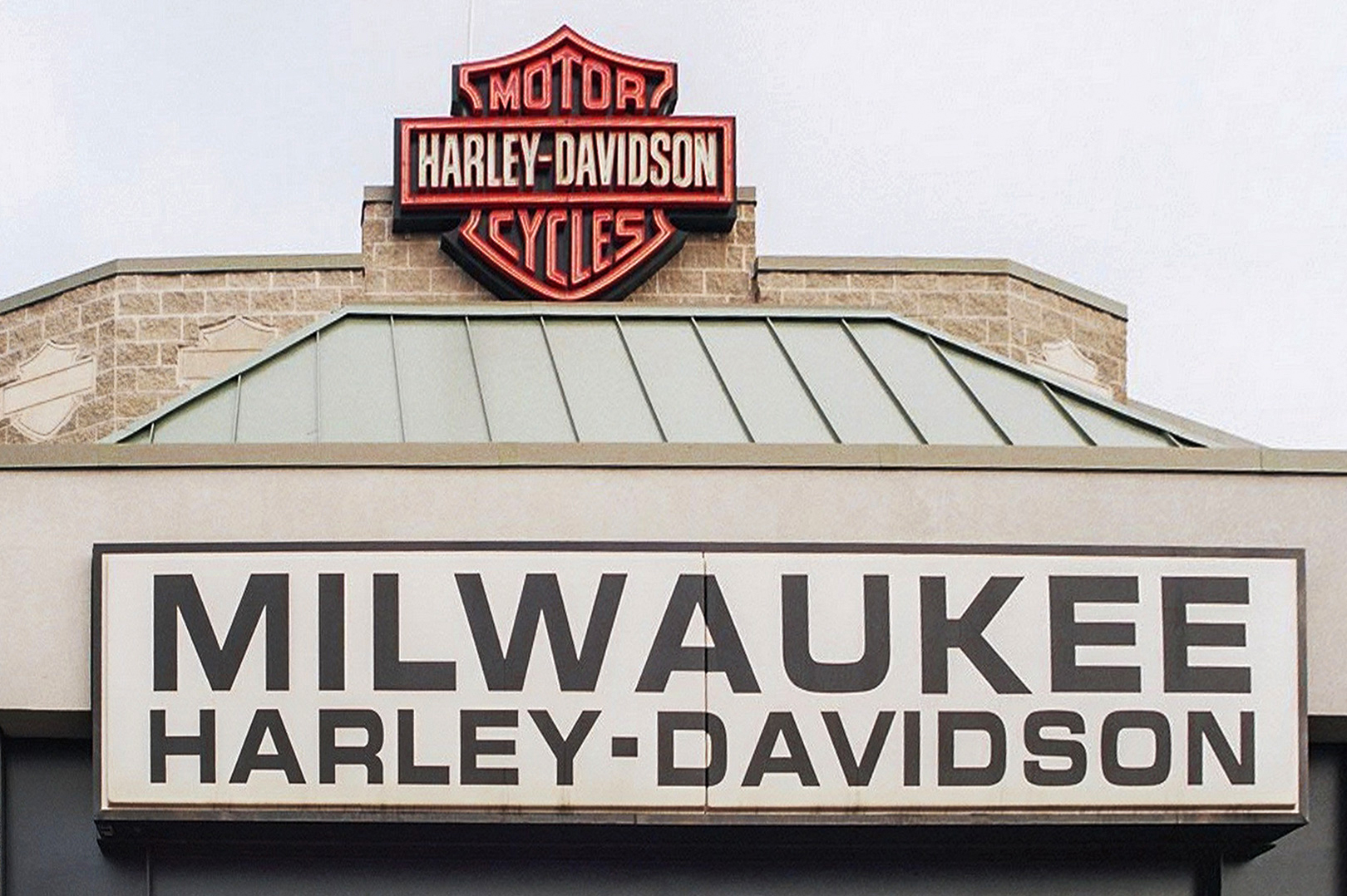 Eingangsbereich eines Harley-Davidson-Ladens in Milwaukee